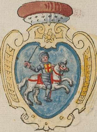 Беларуская (тарашкевіца): Герб Полацкага княства (Połacak) з Пагоняй (Pahonia)